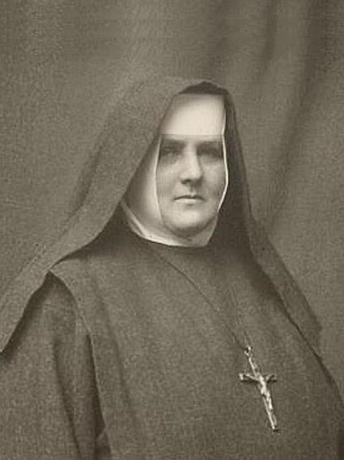 Siostra Bernardyna Maria Jabłońska CSAPI